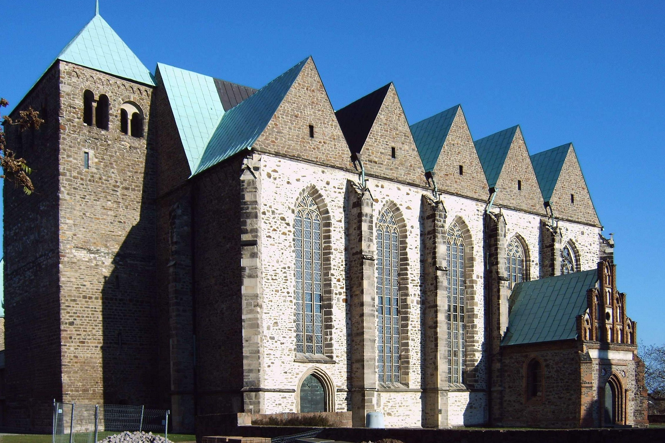 Sankt-Petri-Kirche Magdeburg (Katholische Universitätskirche der Otto-von-Guericke-Universität Magdeburg), Südseite.